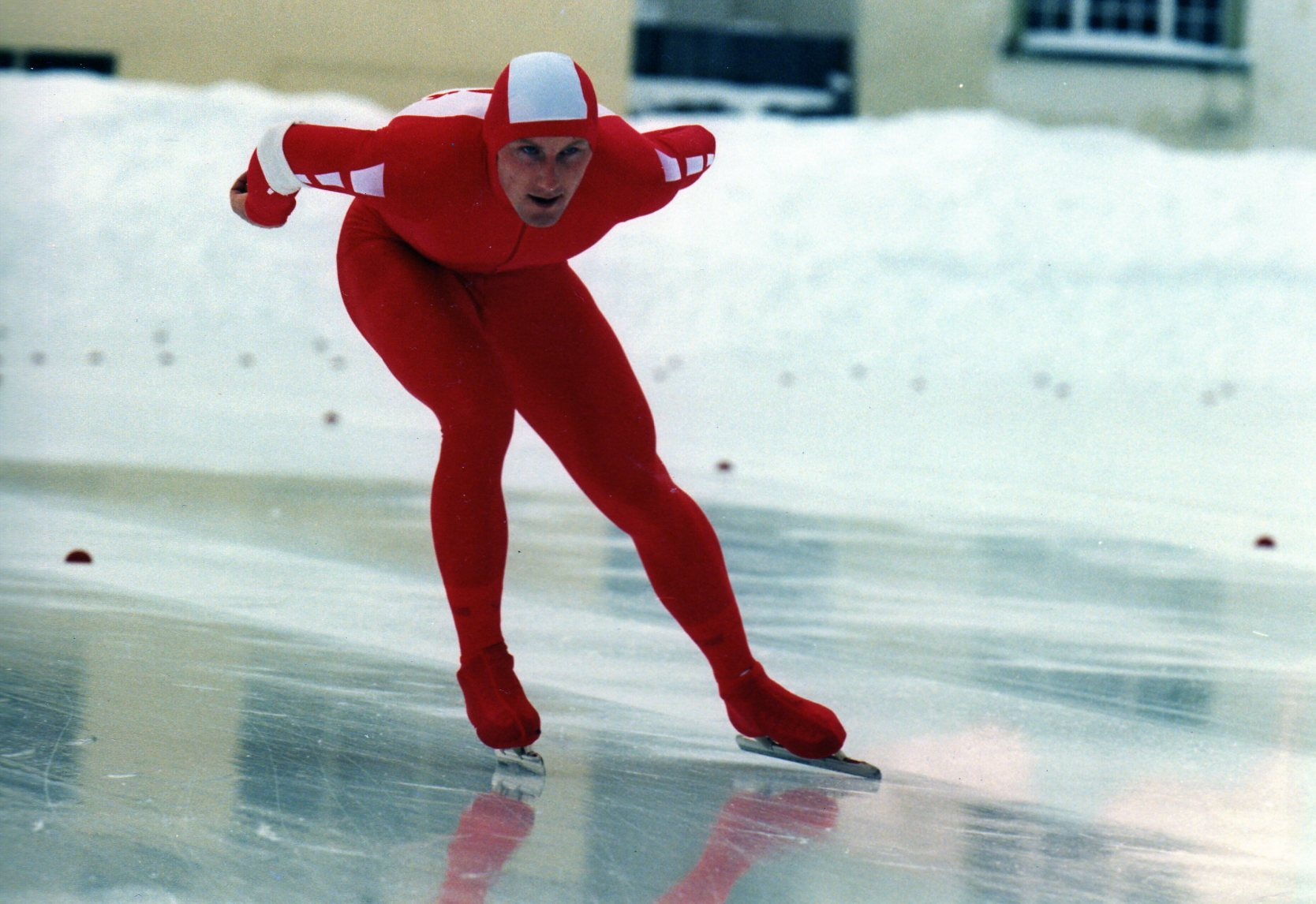 Jaromir Radke in actie tijdens een schaatswedstrijd (worldcup) in Davos, Zwitserland